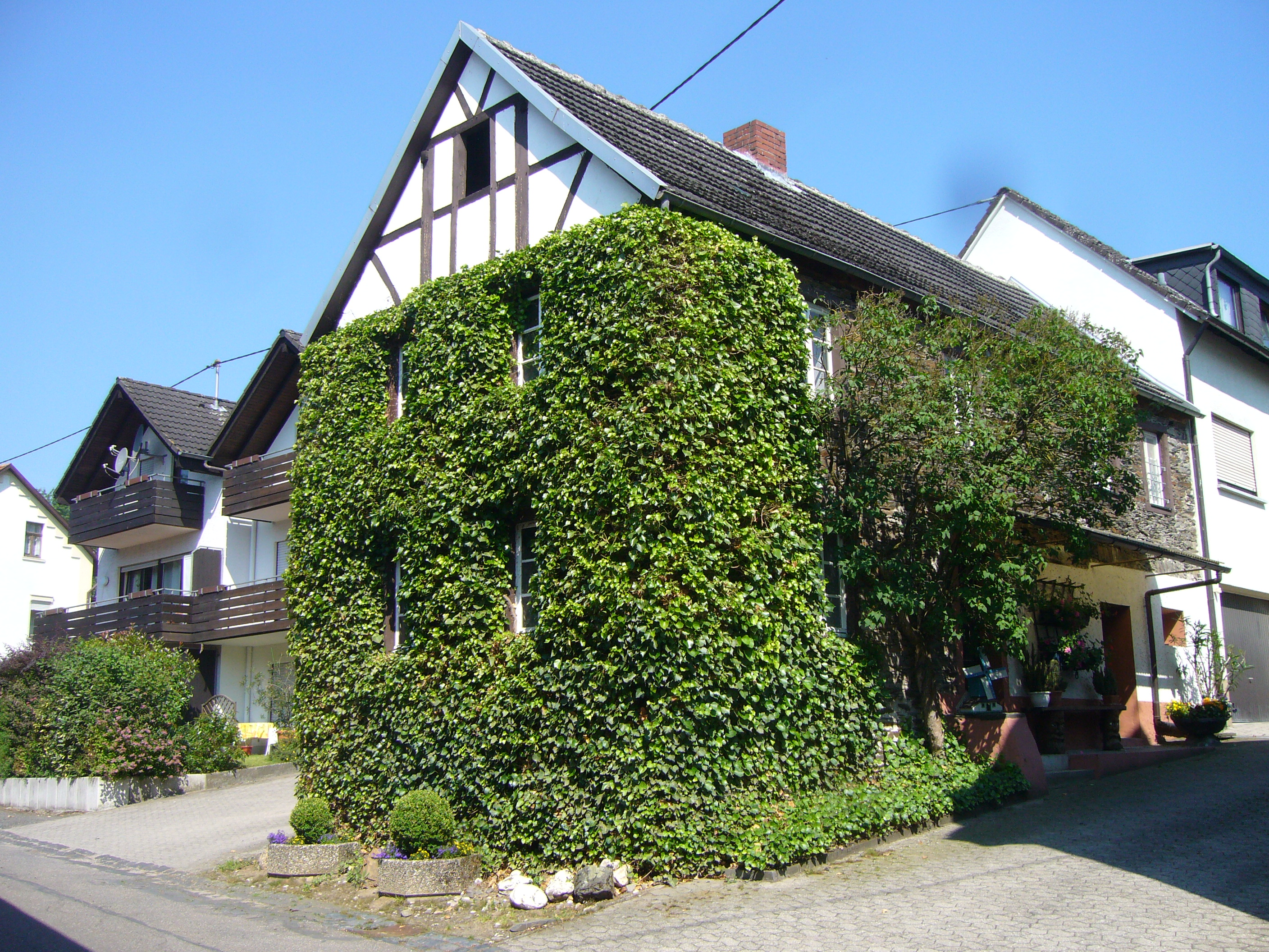 Oberdorfstr.34 Rodenbach